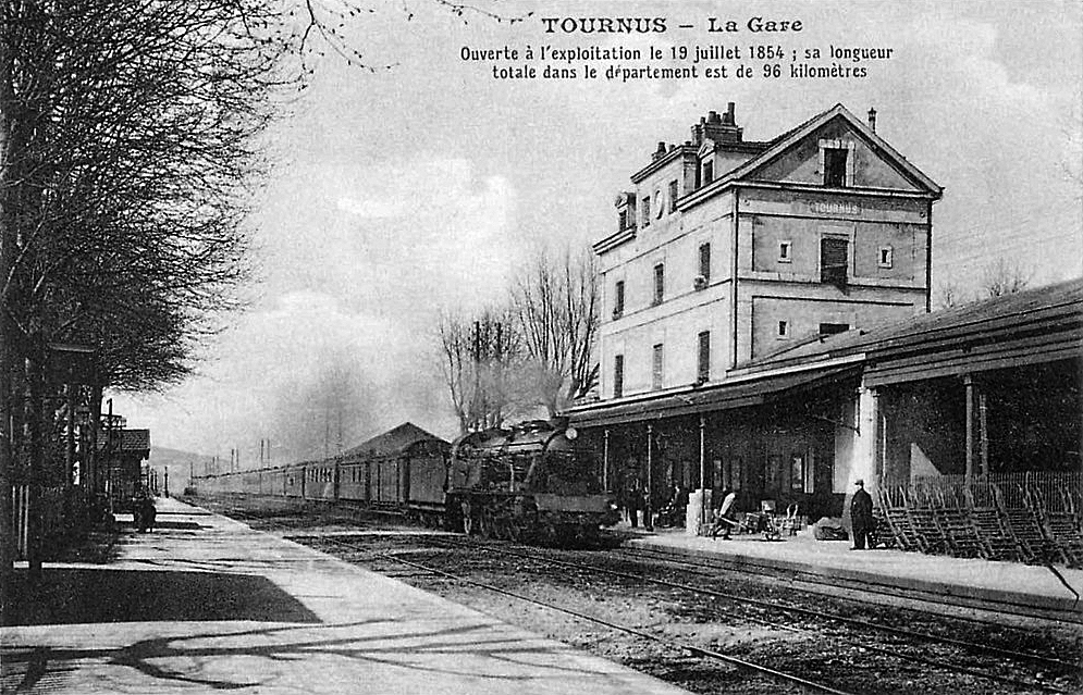 La gare de Tournus au début des années 1900.